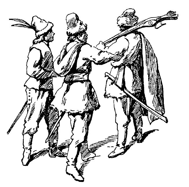 Piechota polska korzona